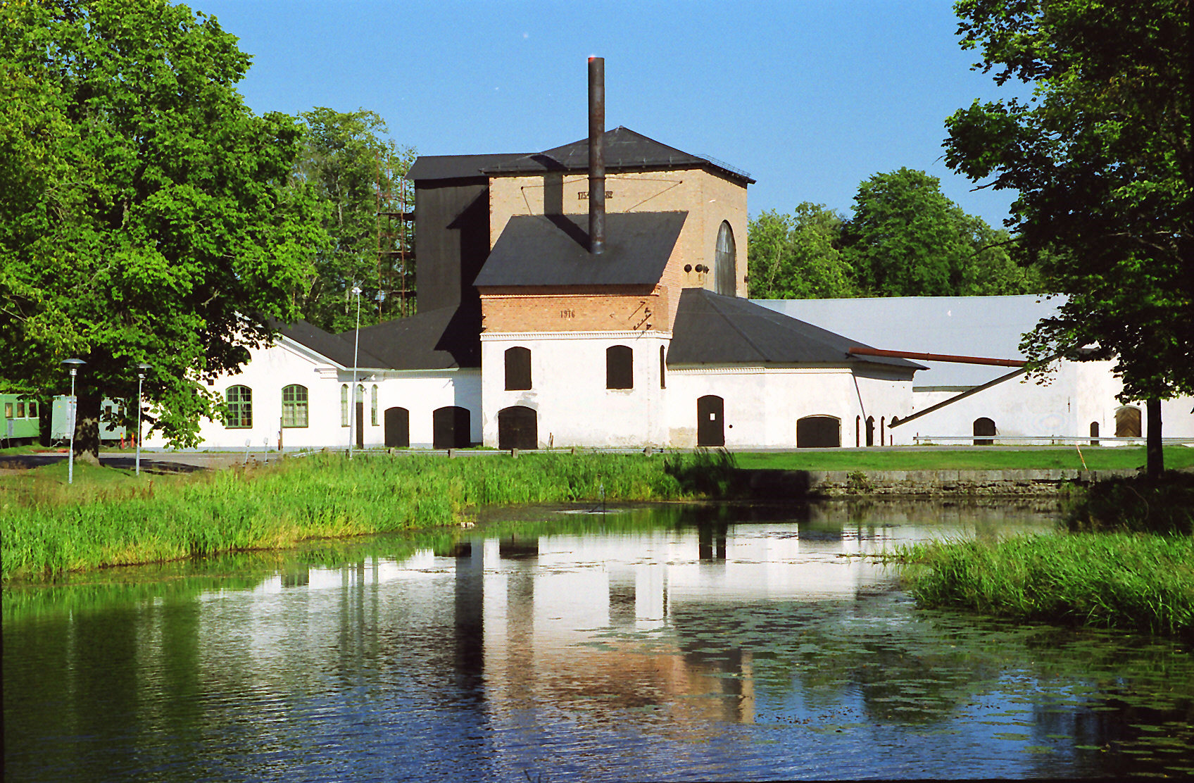 Strömsbergs bruk